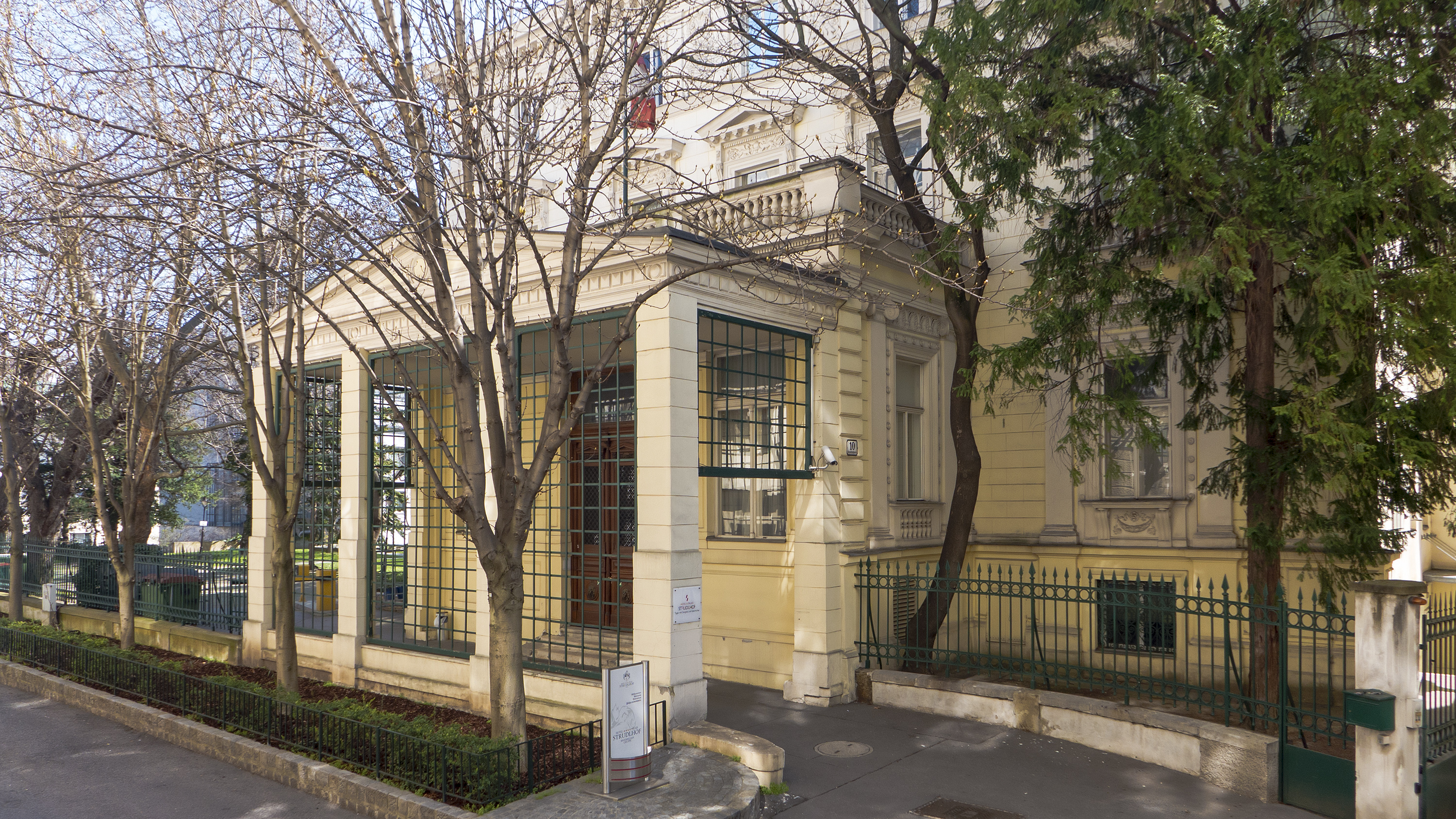 Palais Strudelhof in Wien 9